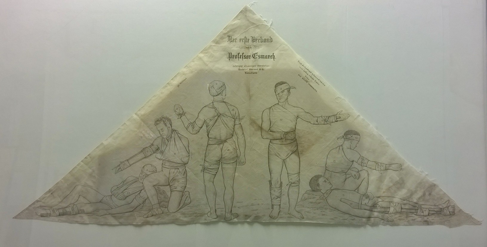 Esmarch-Tuch (hergestellt bei der Gesellschaft f. Baumwollindustrie)